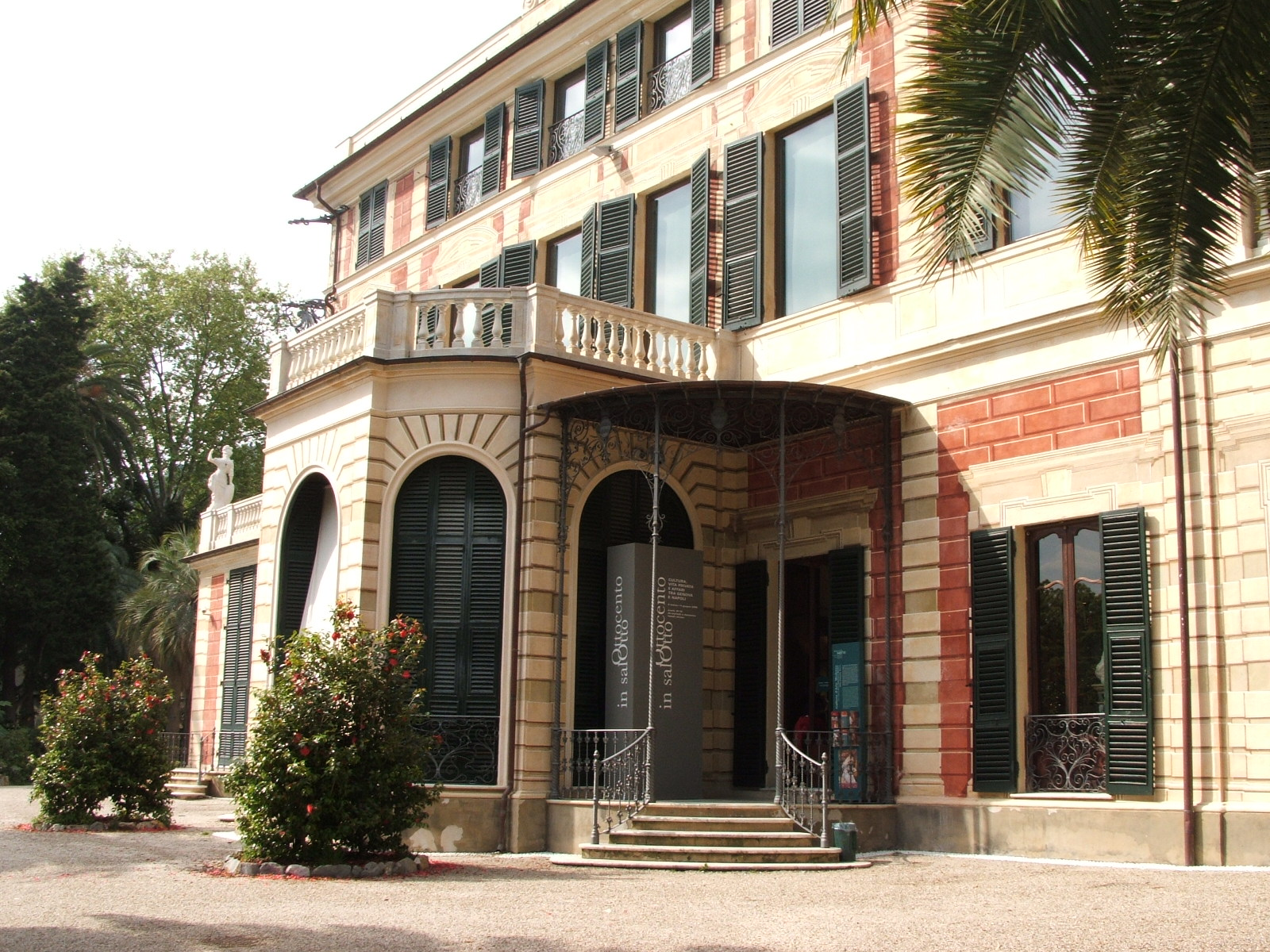 Villa Saluzzo, a Nervi, sede della Galleria d'Arte Moderna